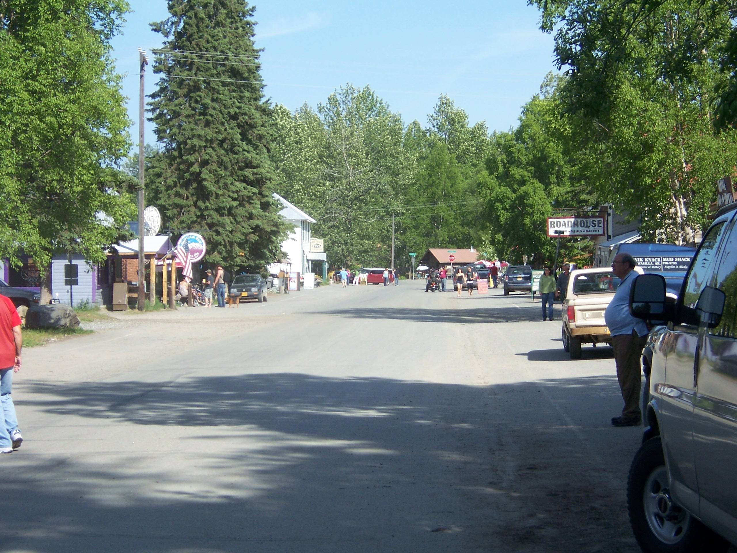 Downtown Talkeetna, Alaska